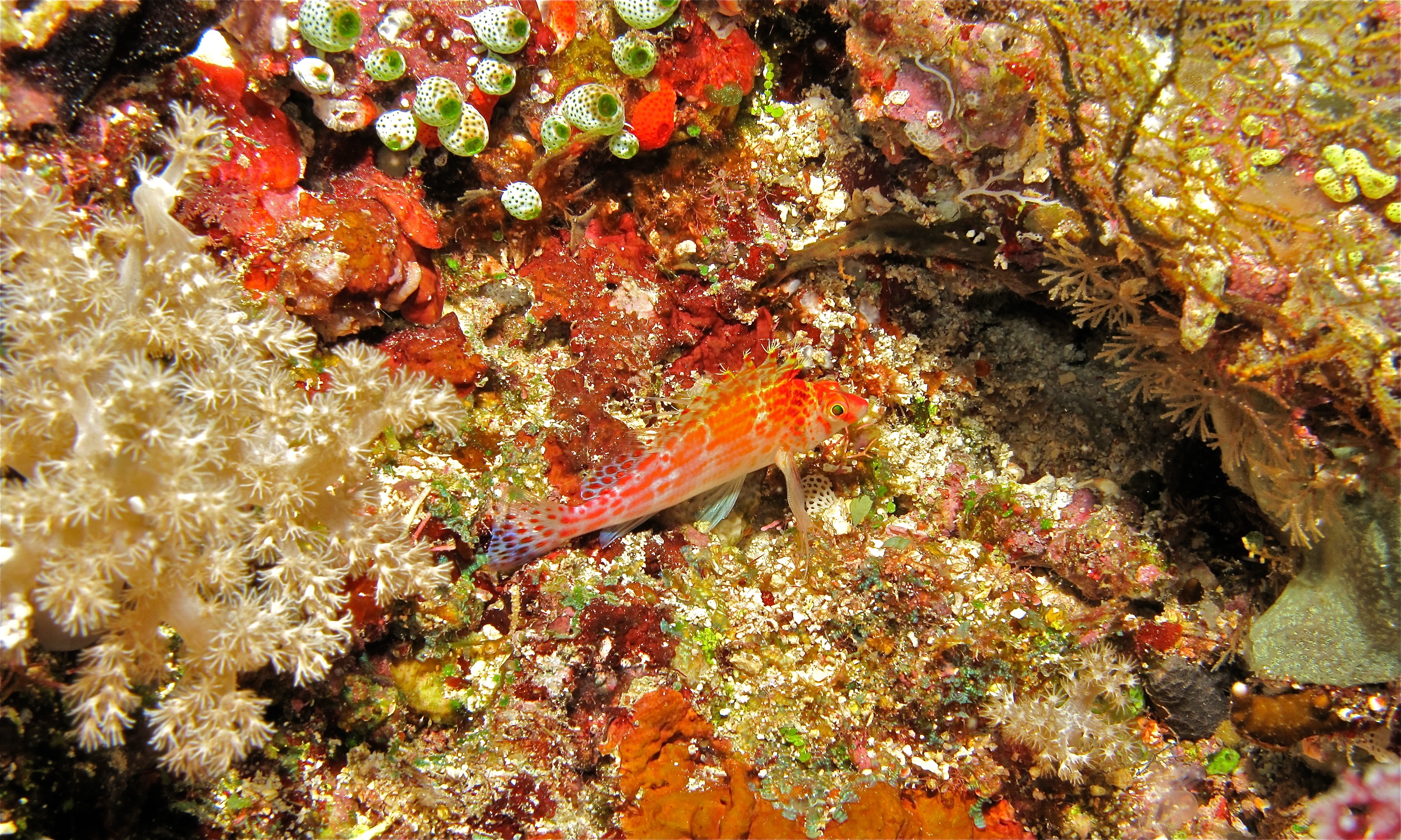 Mandoline, Bunaken Island, Sulawesi, INDONESIA